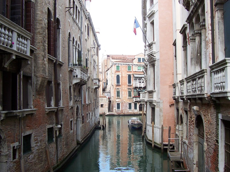 Venezia - Rio del Paradiso